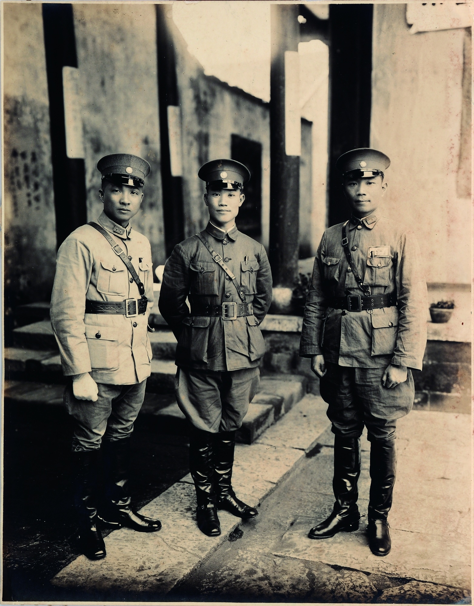 陈诚与第十一师师长罗卓英（左）、第十四师师长周至柔（右）。